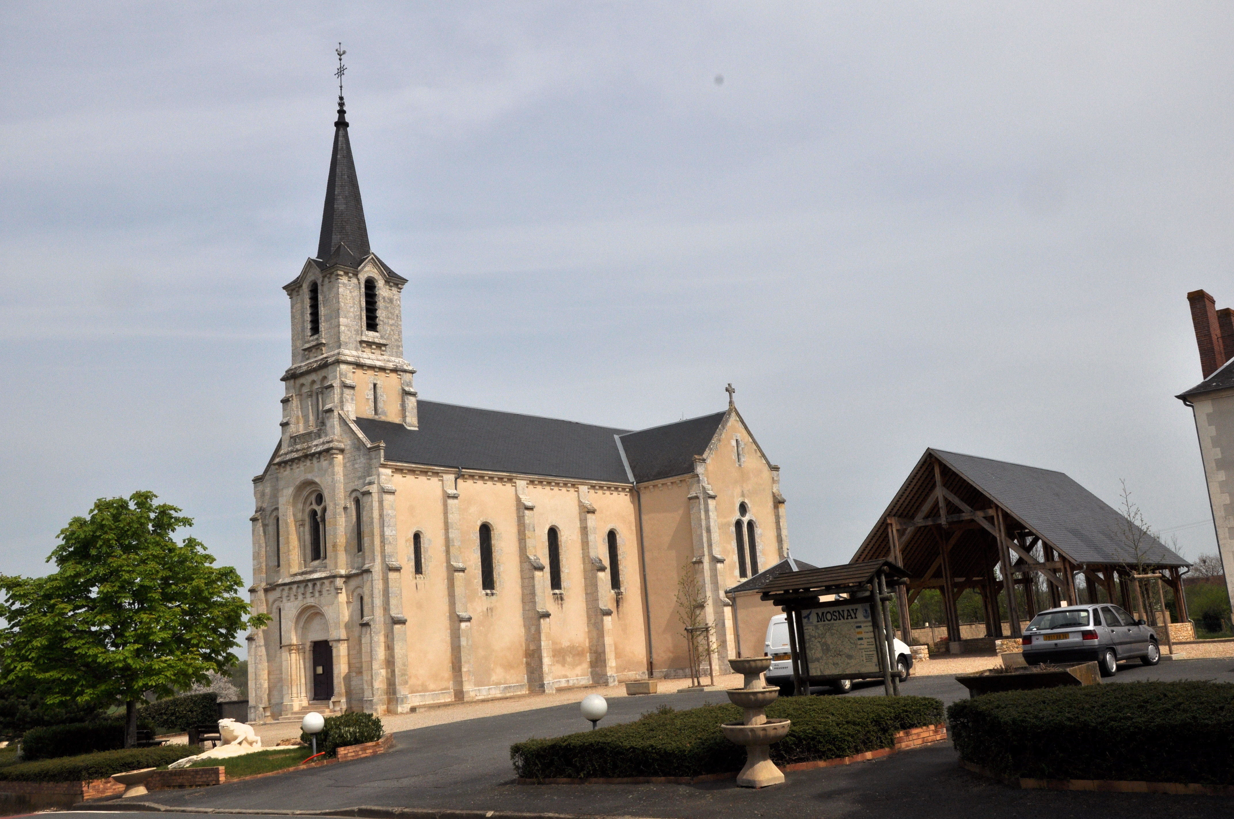 Mosnay (Indre) - Place Principale